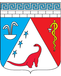 Герб города Саки, Крым